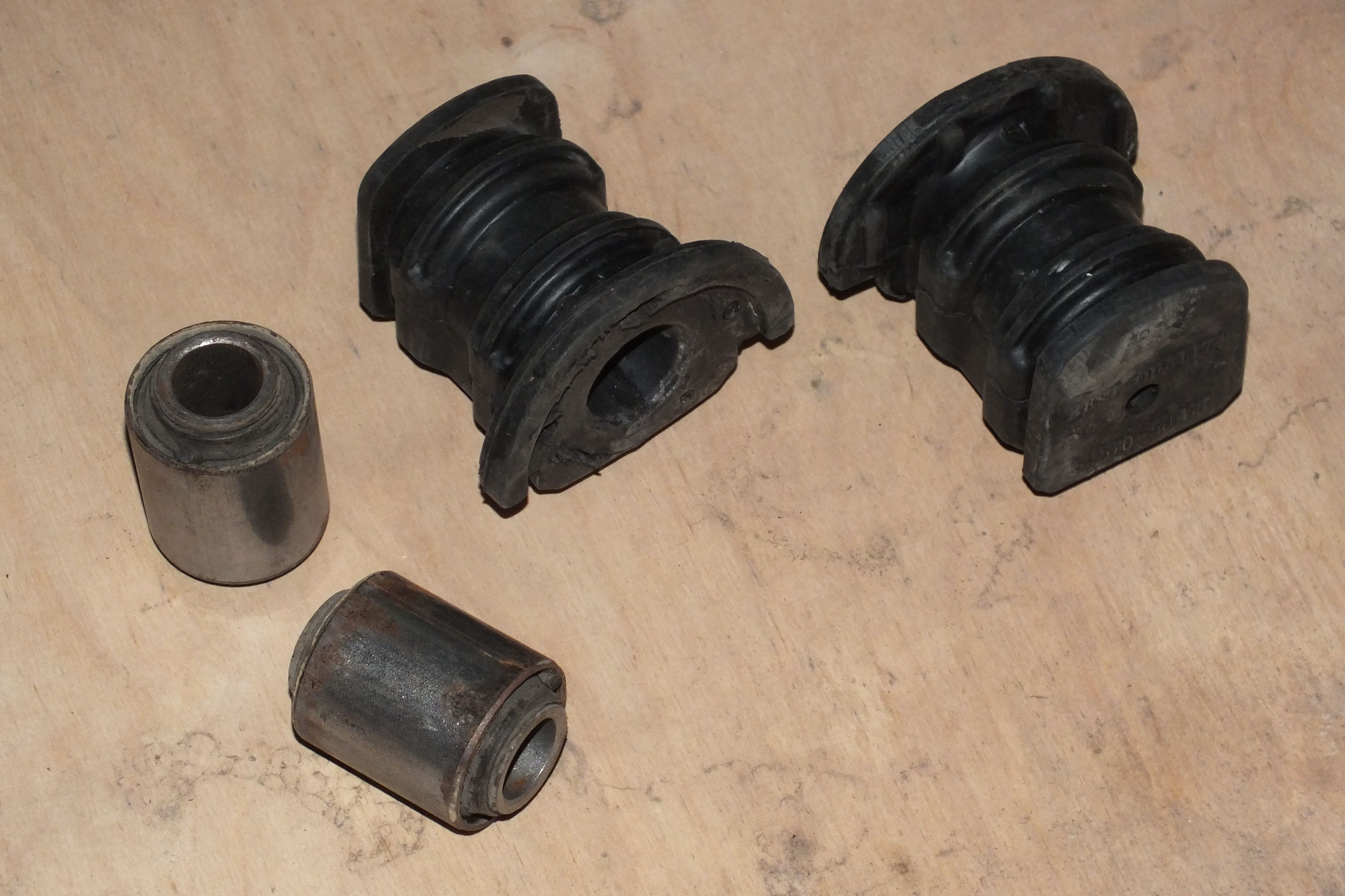 Сайлентблоки автомобиля Ниссан-Авенир